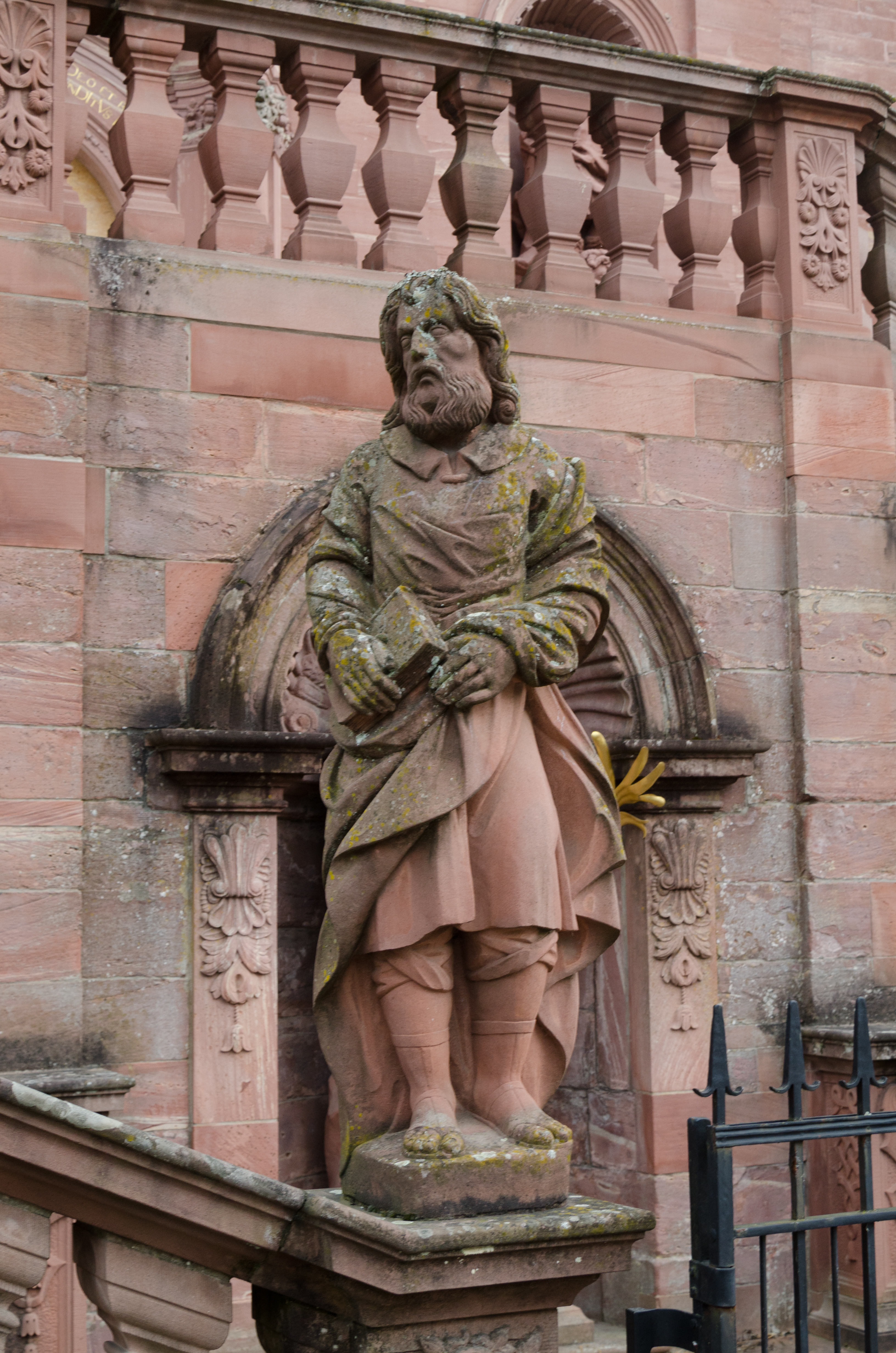 Abteikirche Amorbach